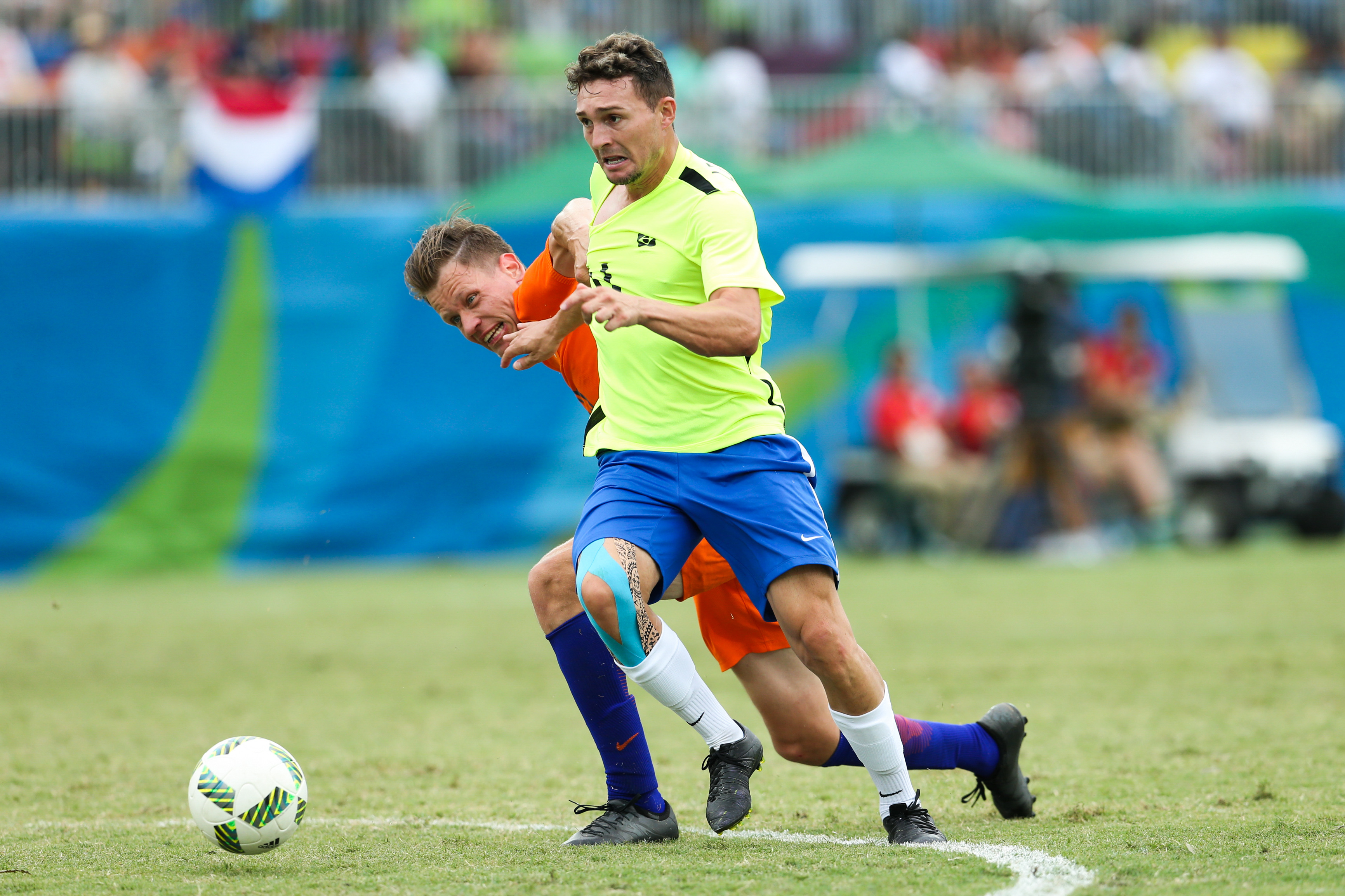 Rio de Janeiro - Time brasileiro de futebol de 7 conquistou a medalha de bronze nos Jogos Paralímpicos do Rio de Janeiro, em jogo contra a Holanda (Tomaz Silva/Agência Brasil)